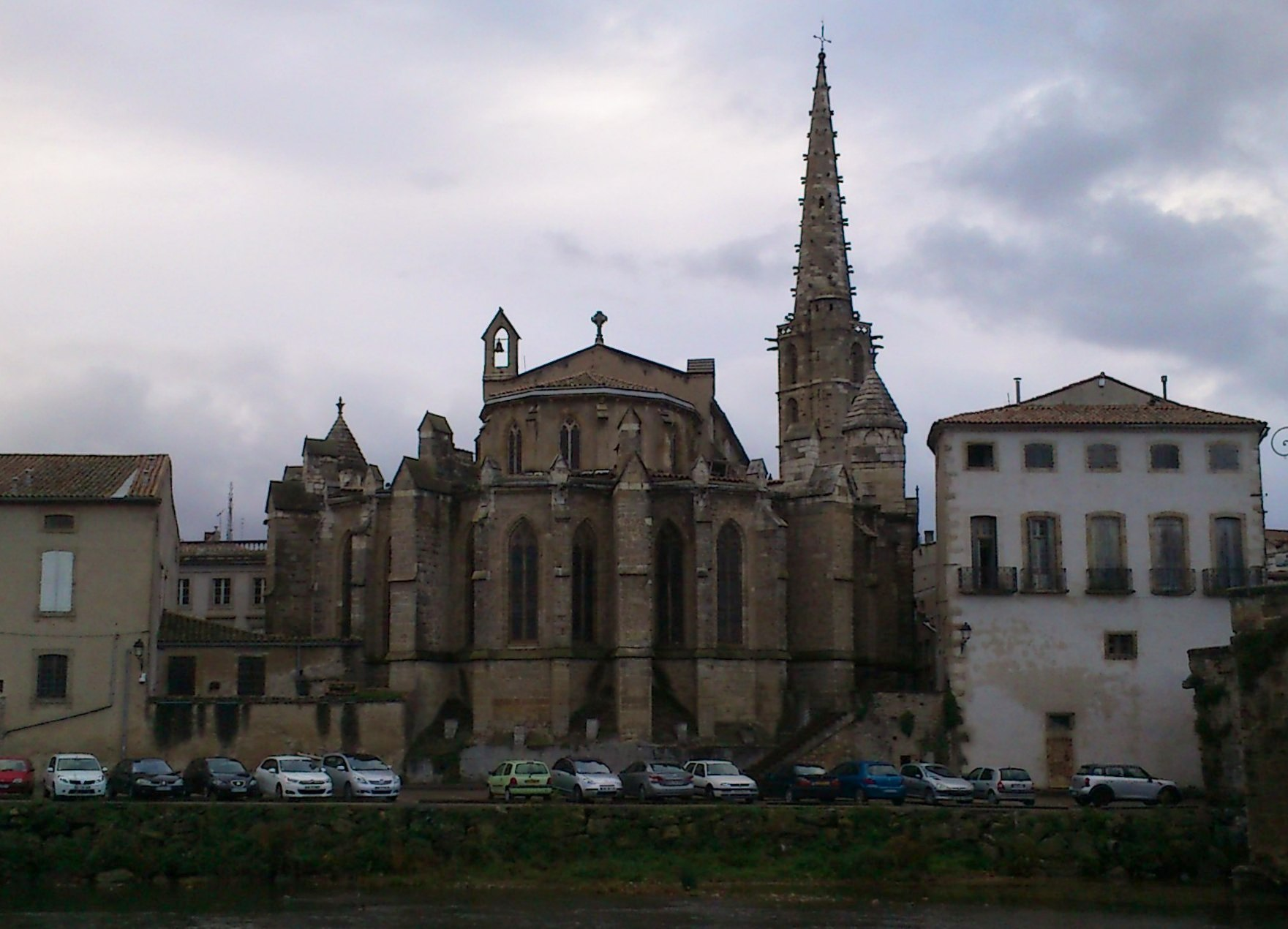 Église Saint-Martin de Limoux (Aude), dans l'après-midi du 4 décembre 2012.